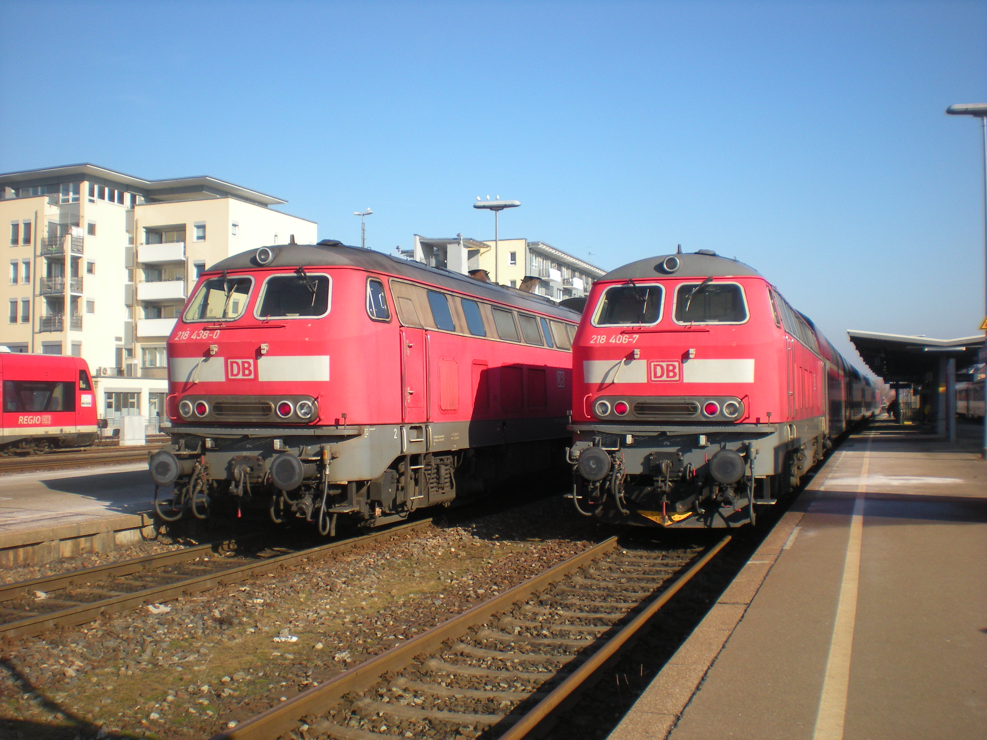 Zwei Diesellokomotiven der Baureihe 218 mit IRE nach Lindau und Ulm am Bahnhof Friedrichshafen Stadt